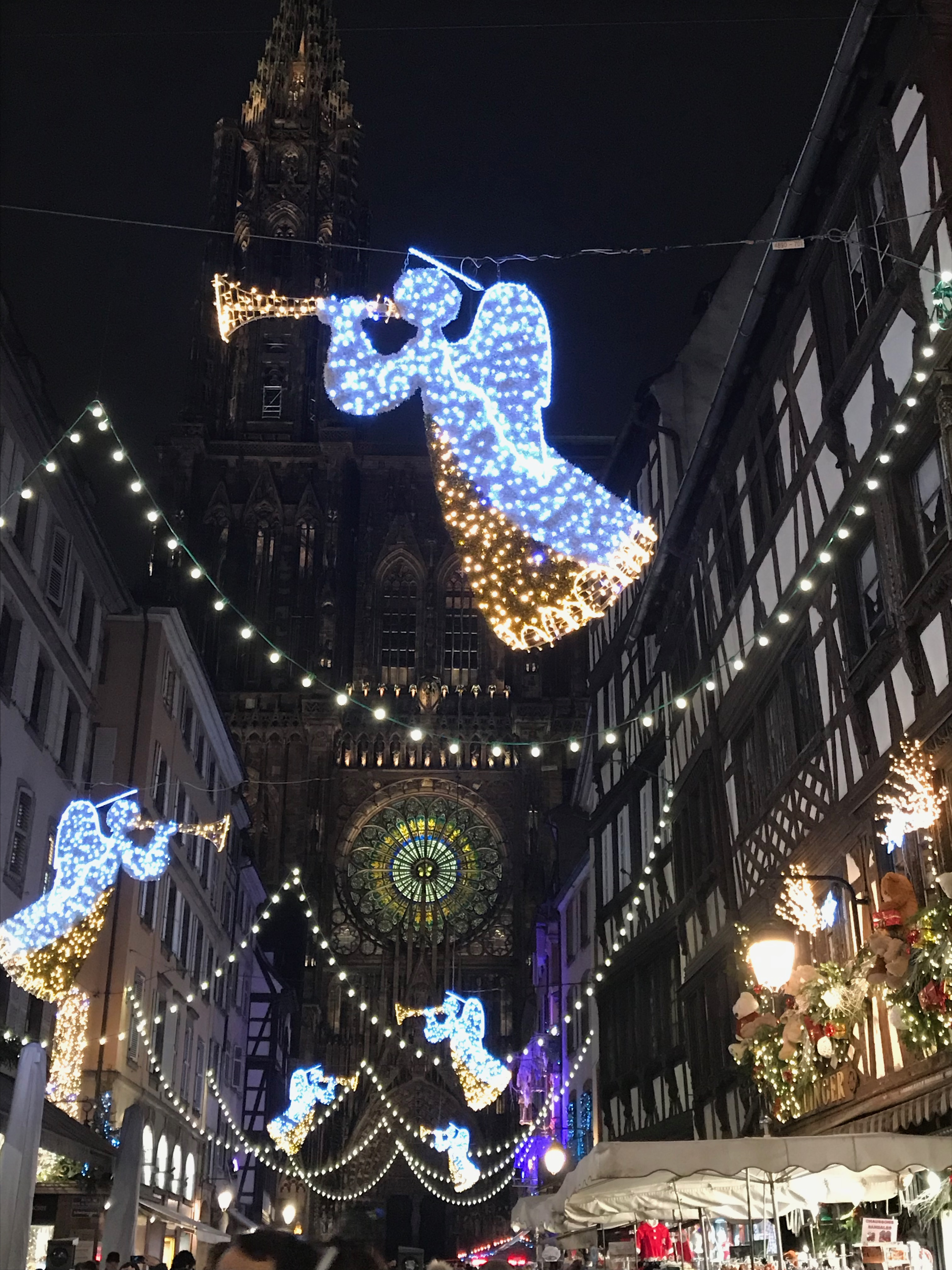 クリスマス時期のストラスブール大聖堂前にて。2017年12月22日撮影。